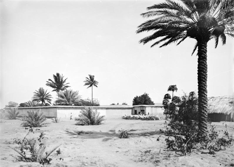 Tabora, eine Tembe [Wohnhaus der Wahehe]